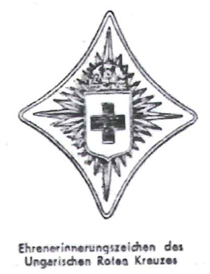 Darstellung des Erinnerungsabzeichens des Ungarischen Roten Kreuzes